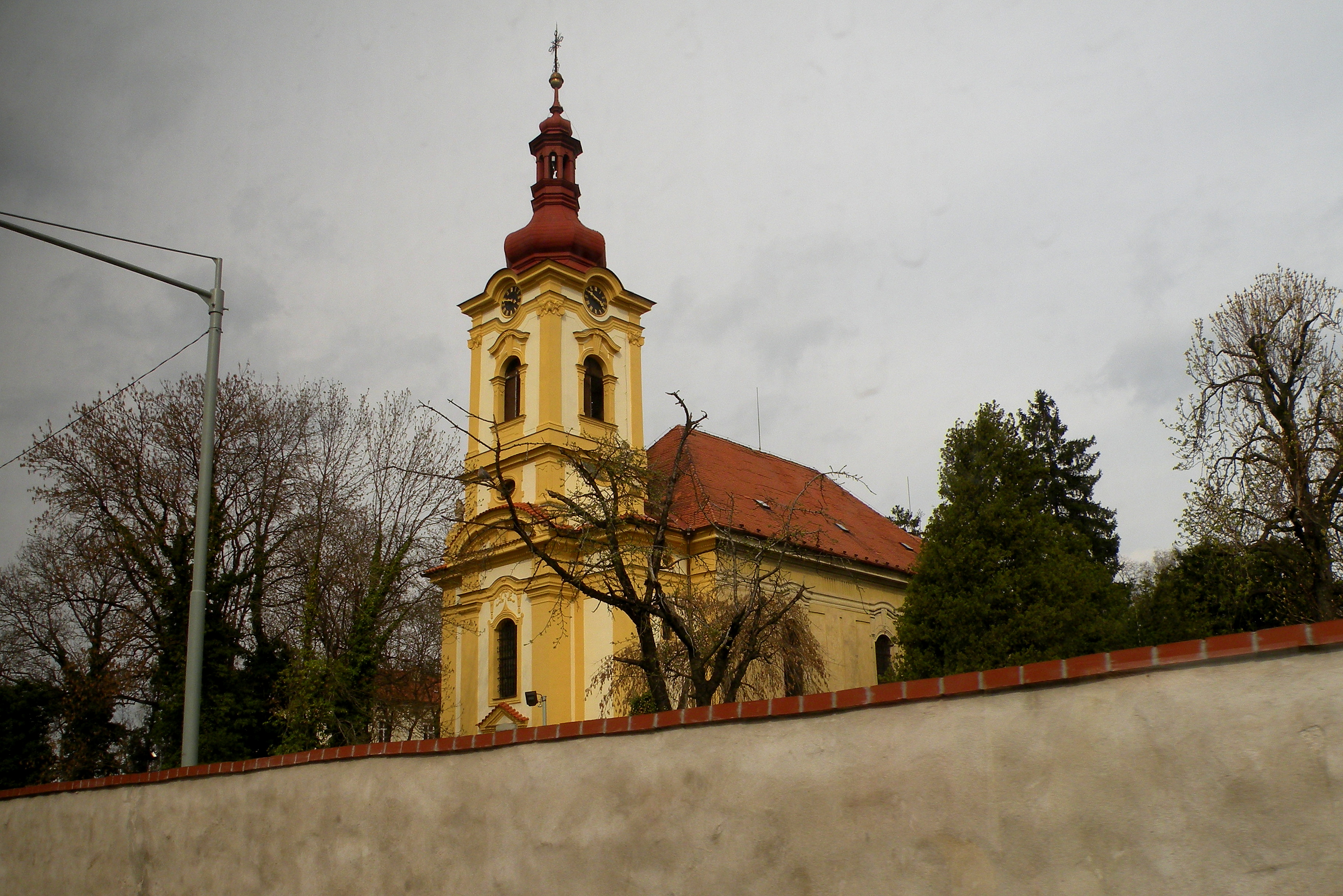 Libeznice, Saint Martin kerk